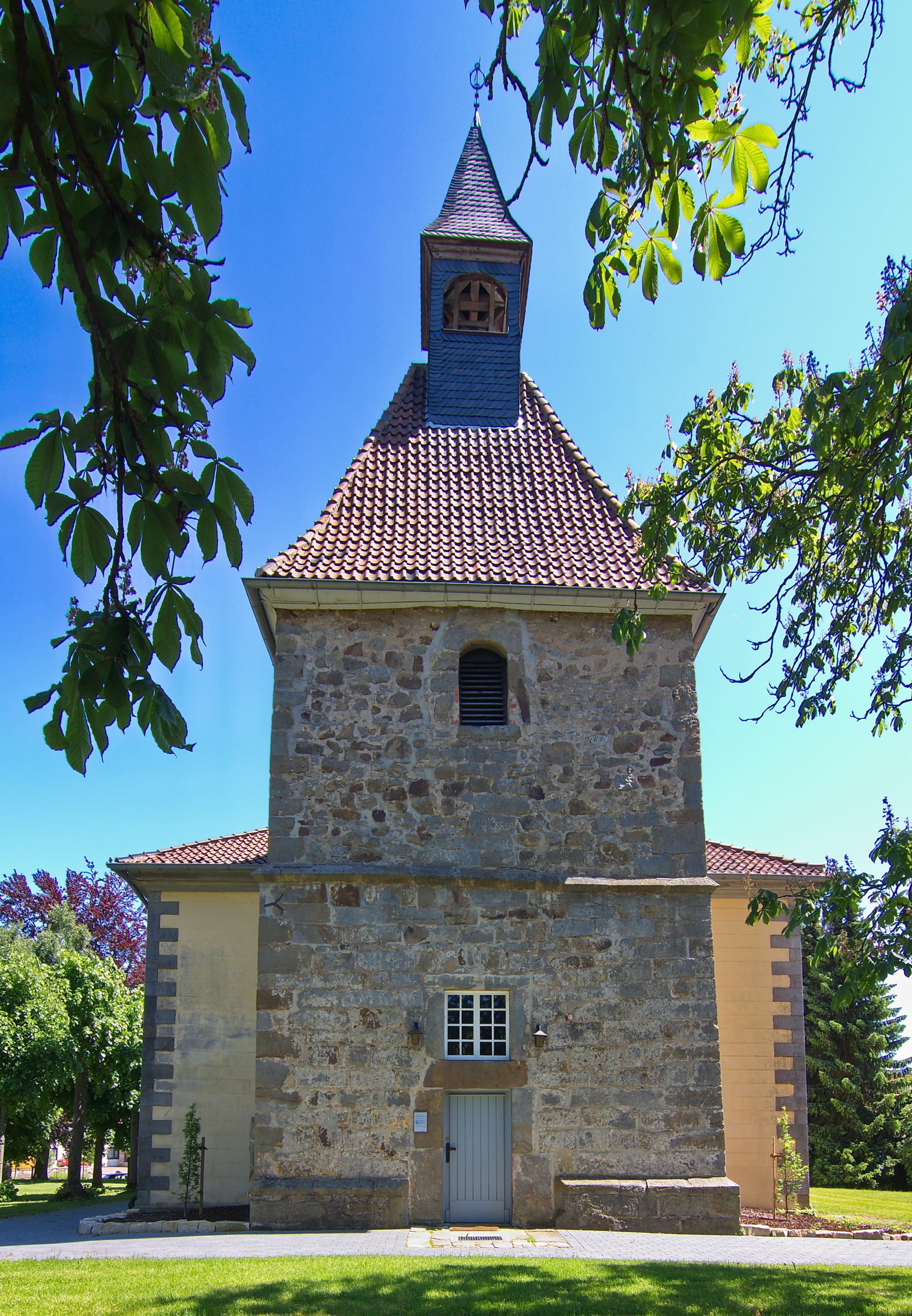 St. Nicolai-Kirche in Bakede (Bad Münder), Niedersachsen, Deutschland.